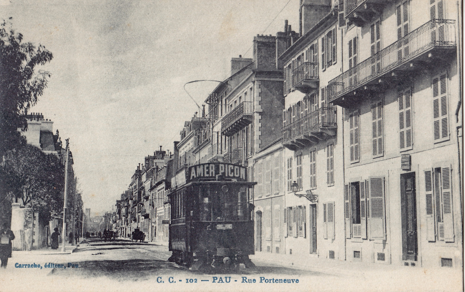 Carte postale ancienne éditée par Carrache à Pau, n°CC 102 : Rue Porteneuve